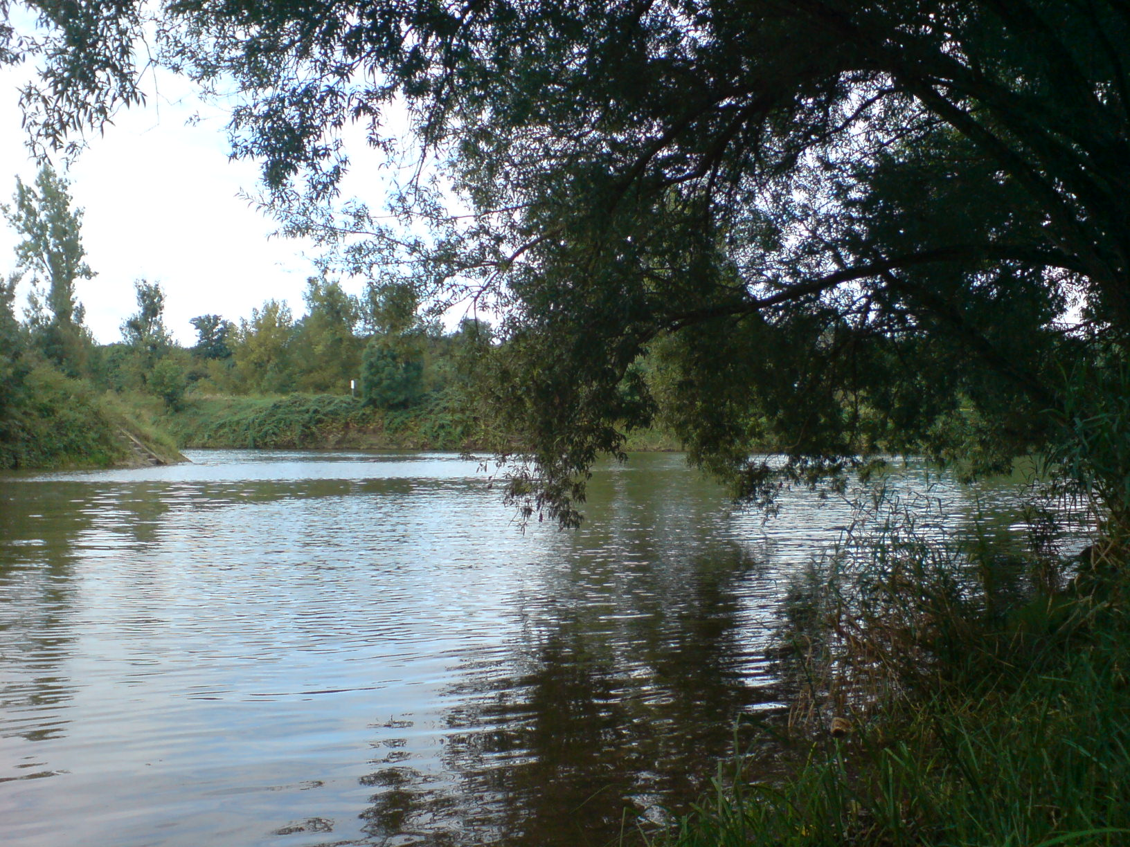 Bad Friedrichshall-Kochendorf: Mündung des Kochers in den Neckar(kanal).